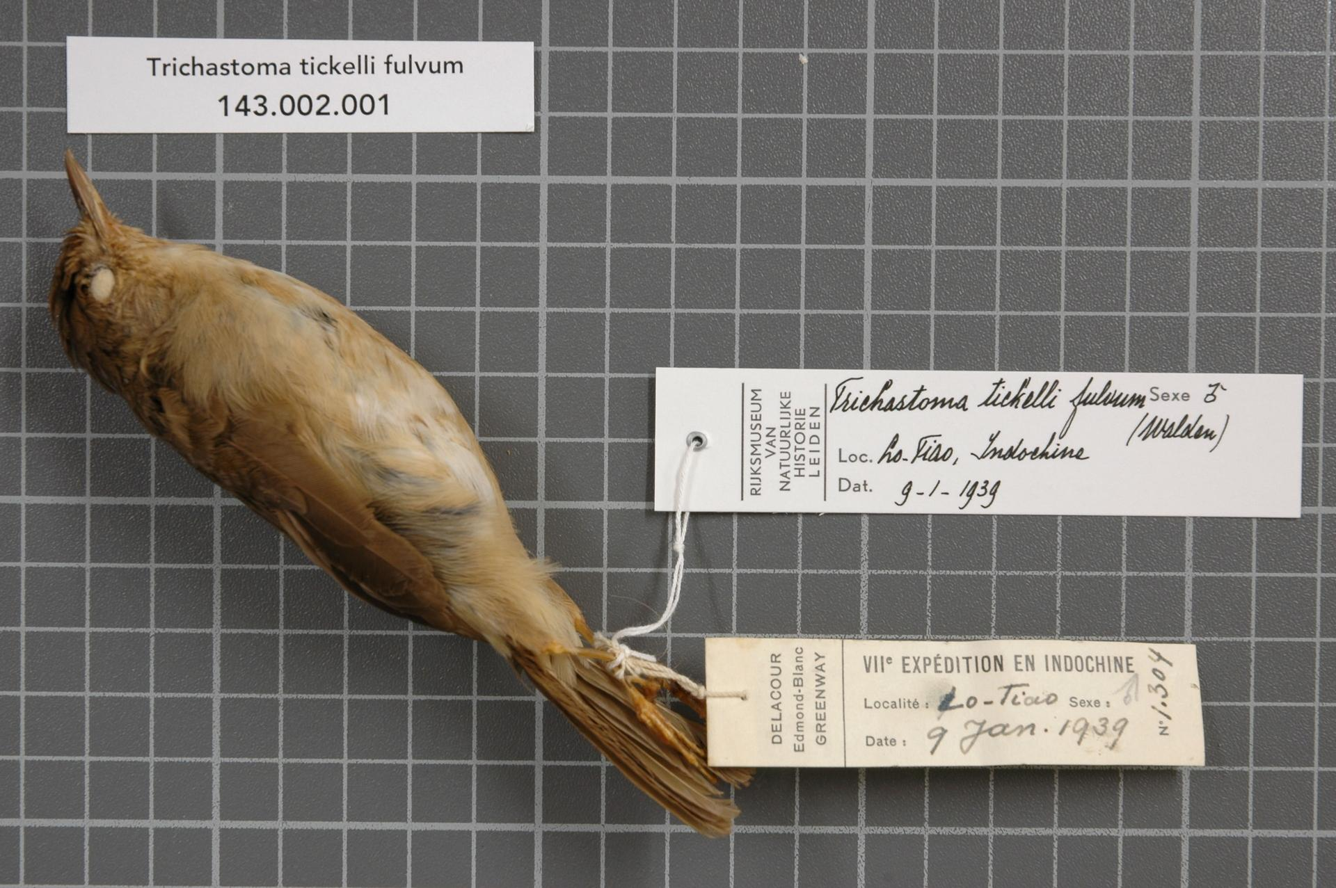 Trichastoma tickelli fulvum (Walden, 1875)